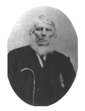 David Bridgeford